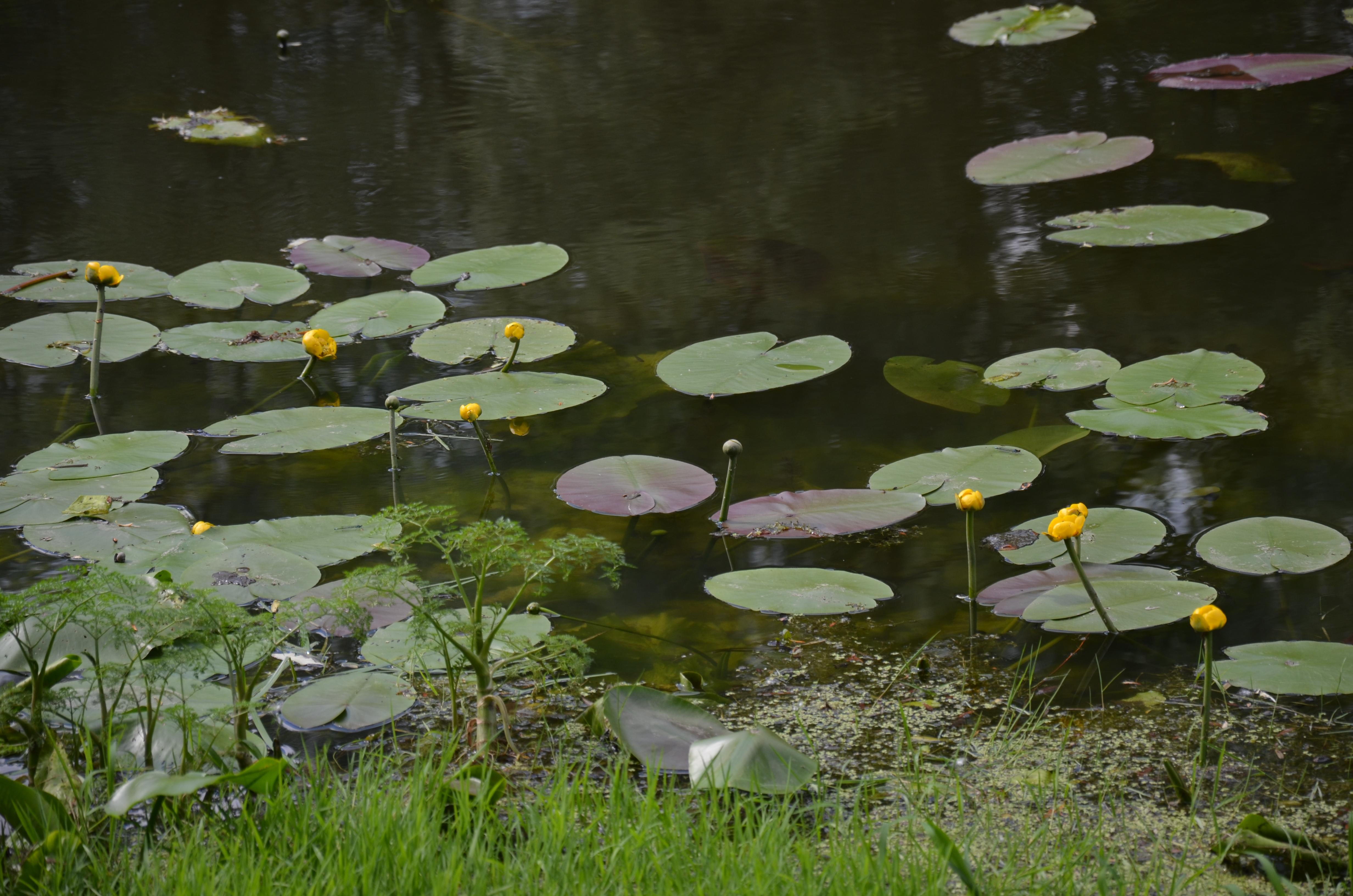 Зачарована Десна, Вишгородський район та Броварський район